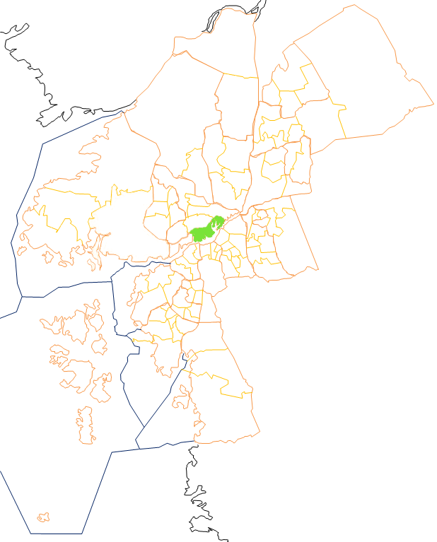 Karta som visar primärområdes belägenhet i Göteborg